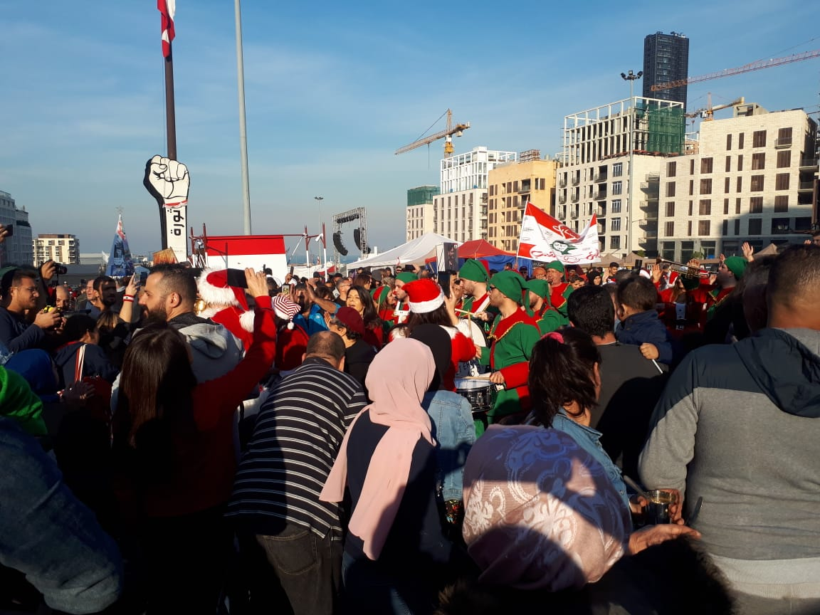 Proteste auf dem beiruter Märtyreplatz Dezember 2019